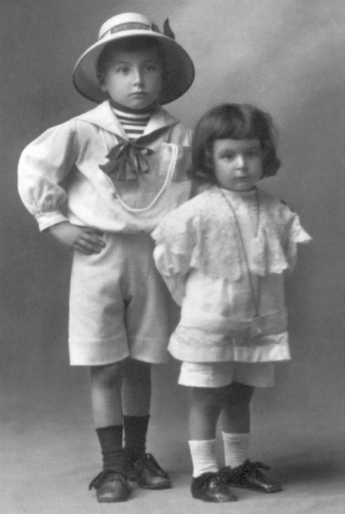 Os dous irmáns. Xaquín Lorenzo Fernández e Xurxo Lorenzo Fernández